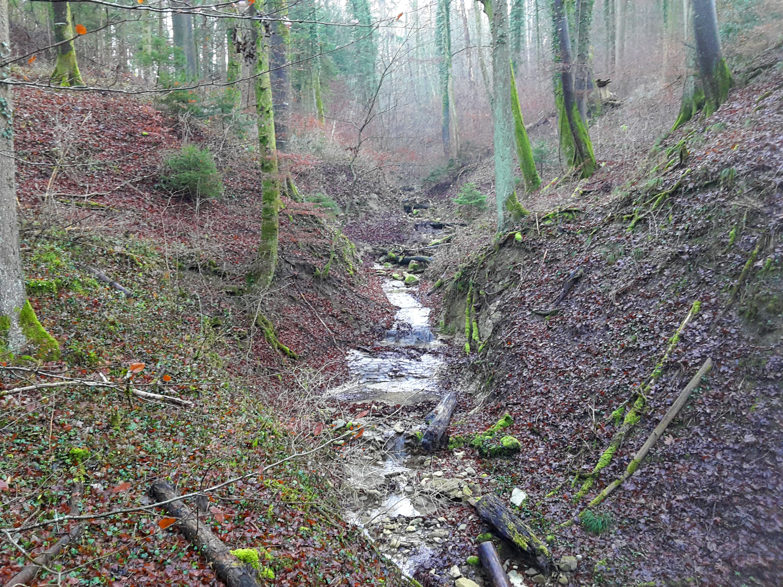 Im Hornweidbach Tobel mit Blick bachaufwärts, Kanton Zürich